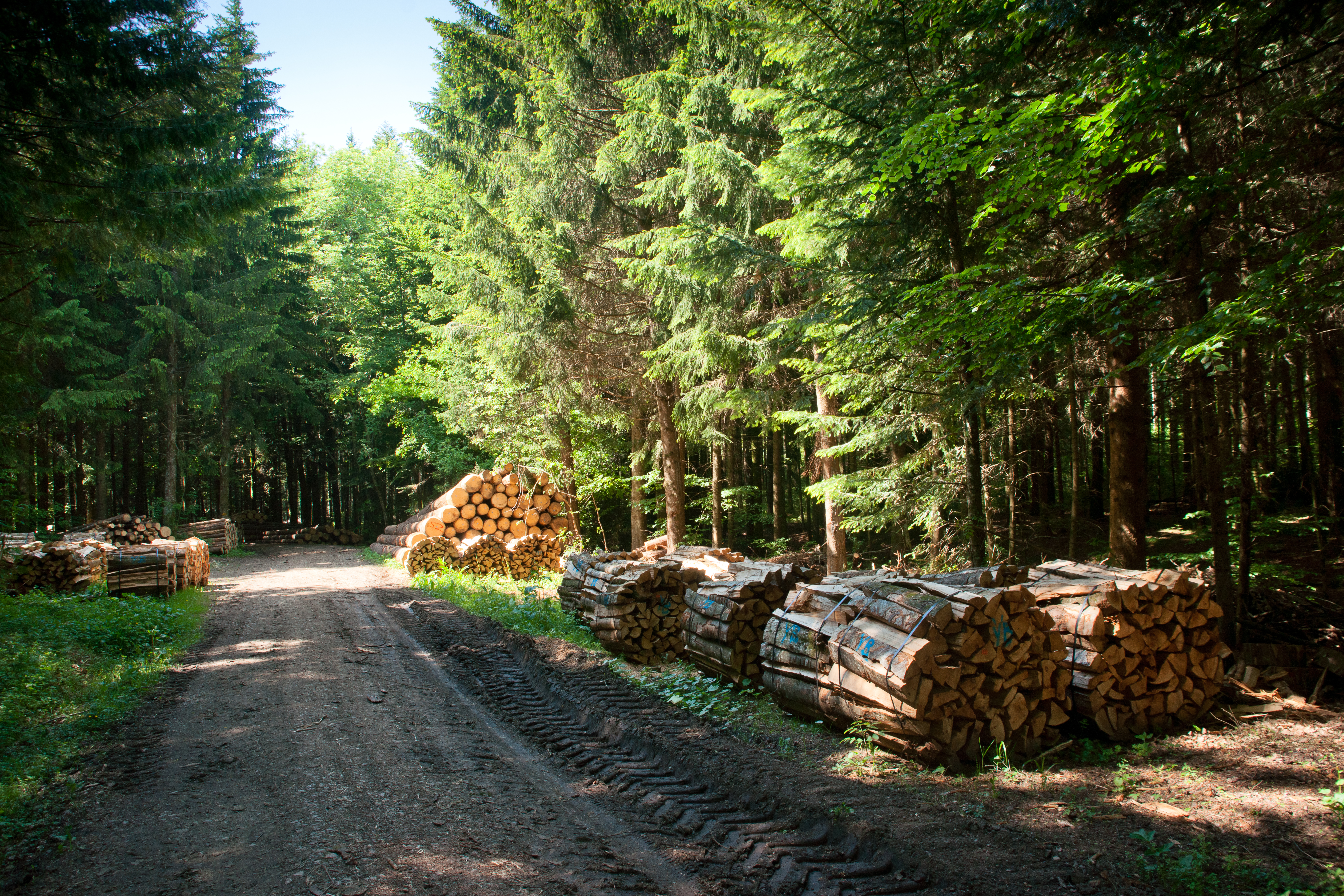 Exploitation forestière à Ecoteaux (dans le bois de l'Erberey), canton de Vaud, Suisse.